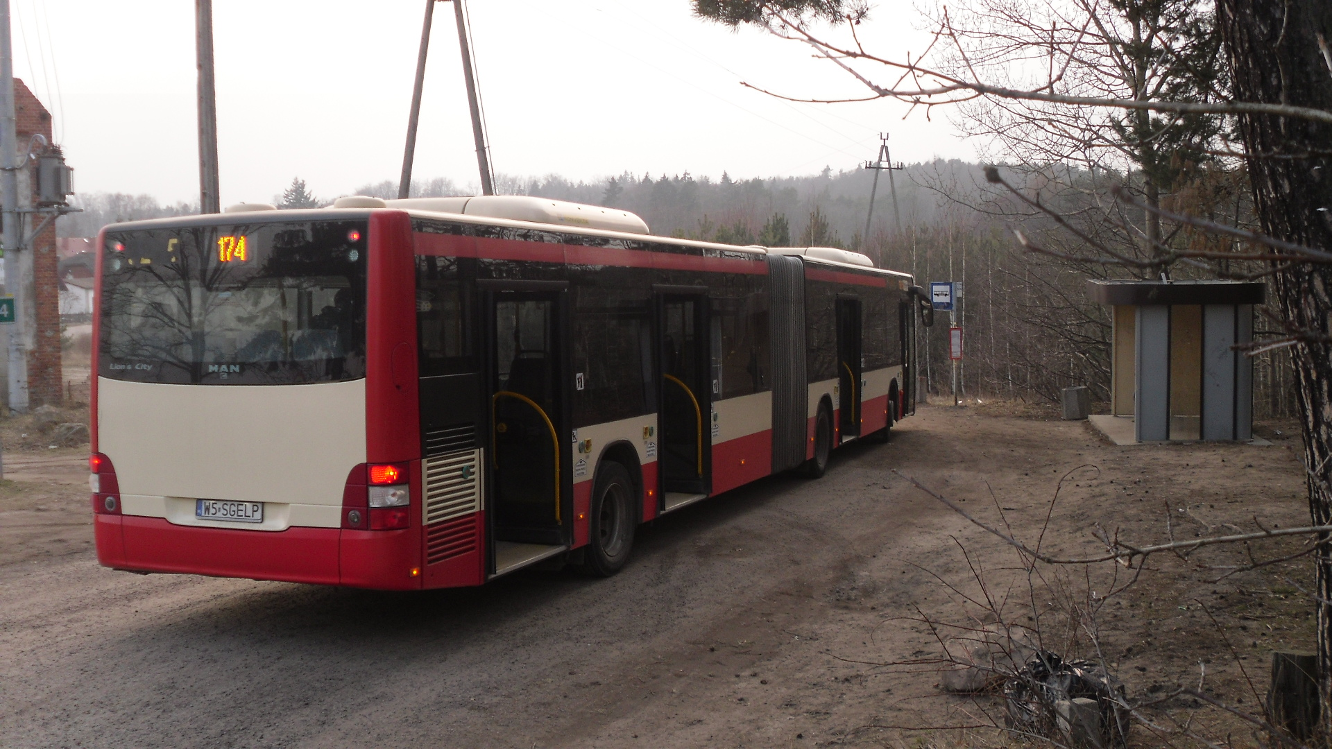 Otomin, pętla autobusowa.